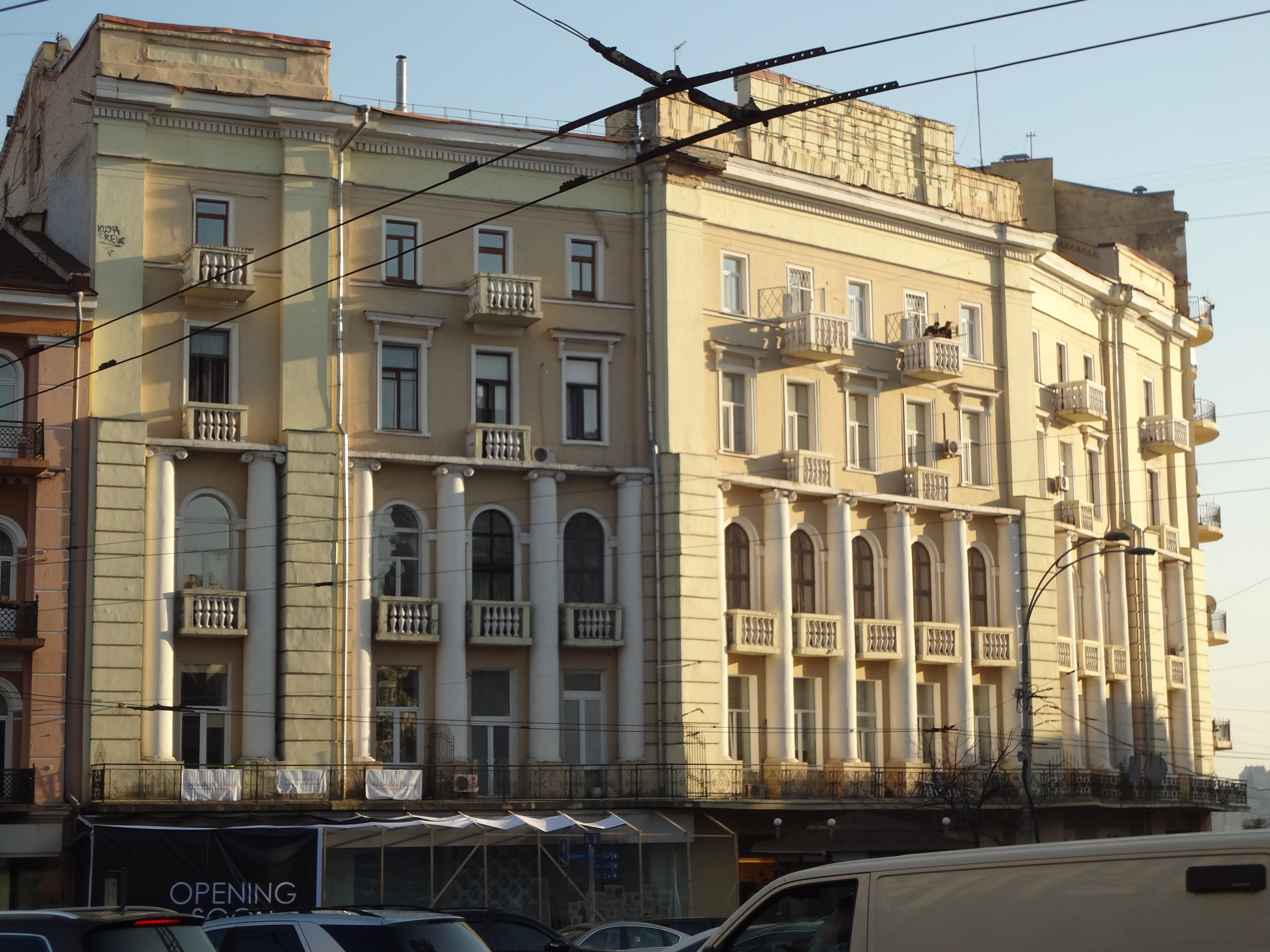 Будинок прибутковий, Київ, Червоноармійська вул., 25